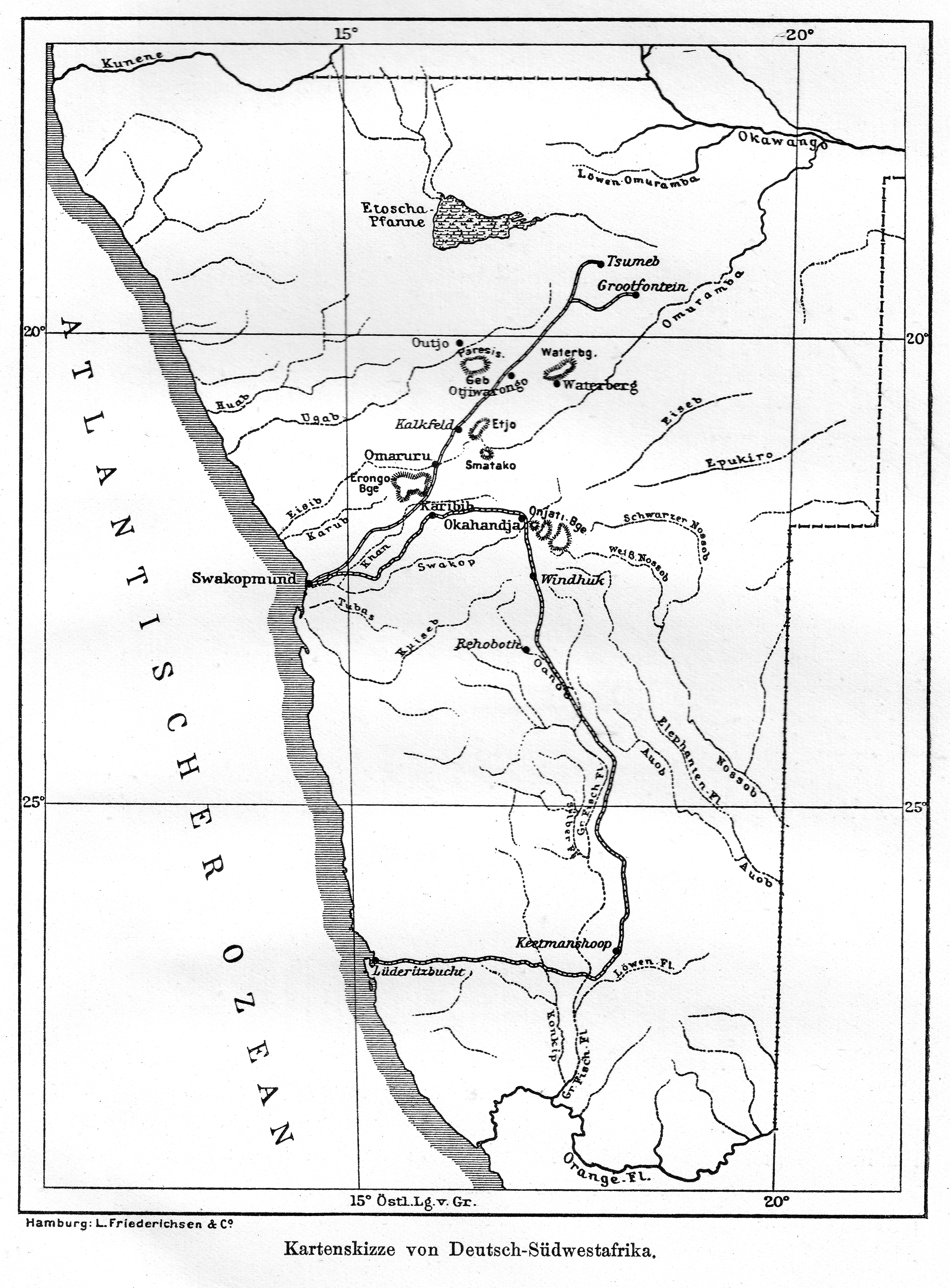 Kartenskizze aus Johannes Gad: Die Betriebsverhältnisse der Farmen des mittleren Hererolandes – Abhandlungen des Hamburgischen Kolonialinstituts Band XXVIII. – Reihe E. Angewandte Naturwissenschaften, Landwirtschaft und Technologie – Band 5 – Mit einer Karte, Hamburg, L. Friederichsen & CO., 1915, S. 147